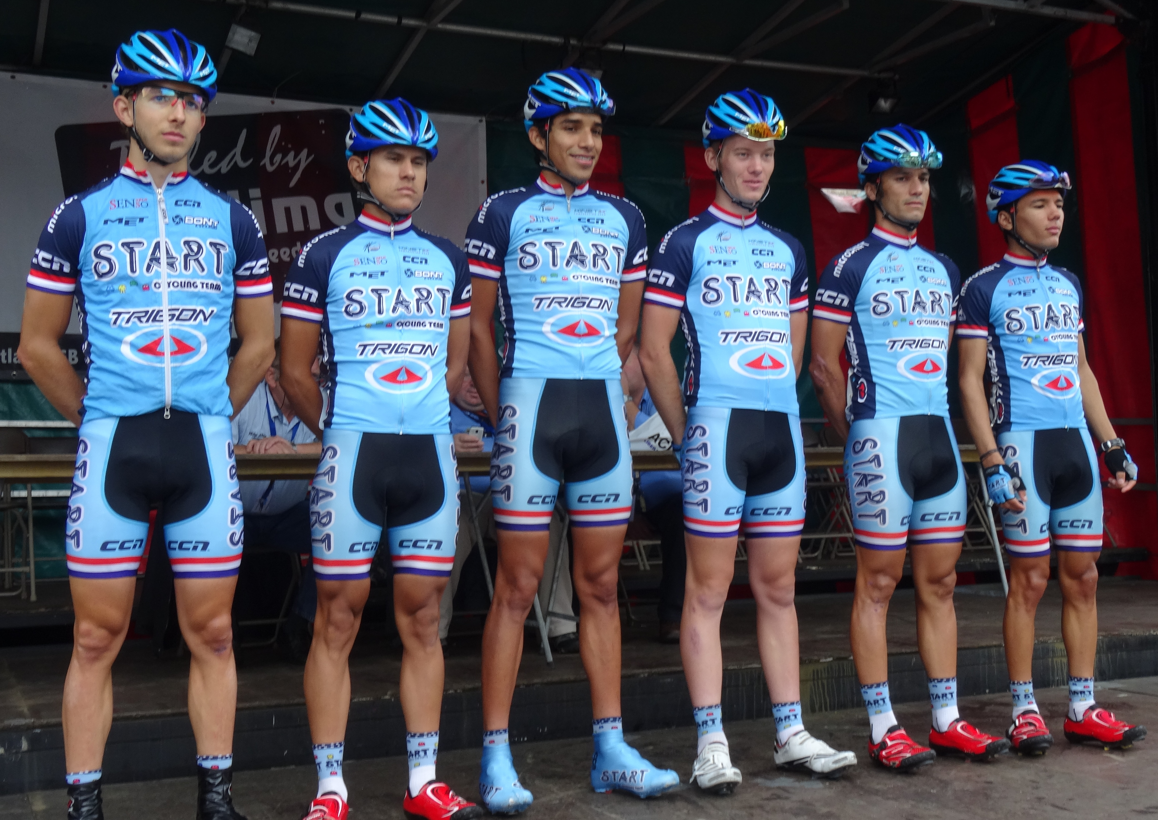 Reportage photographique réalisé le dimanche 10 août à l'occasion du départ et de l'arrivée de la Flèche du port d'Anvers 2014 à Merksem (Anvers), Belgique.